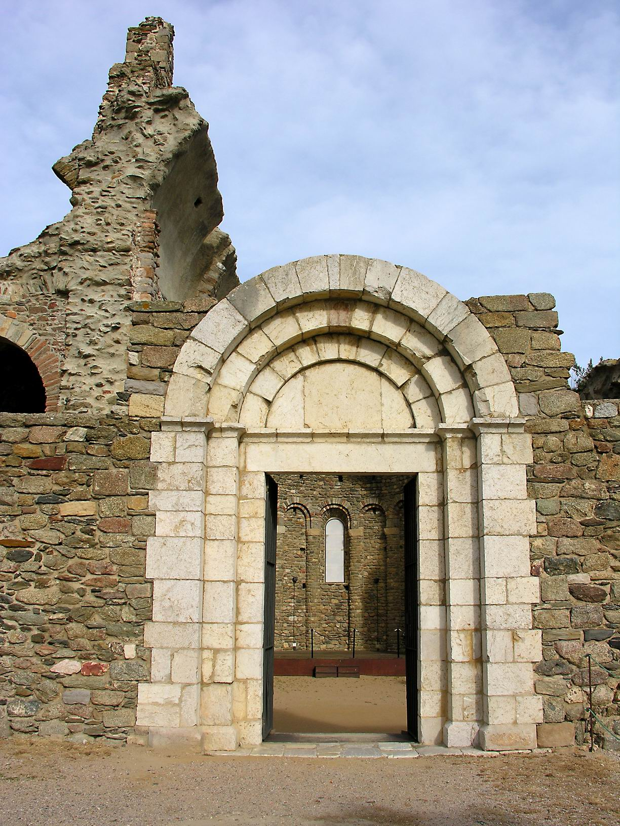 Porta de l'església del monestir de Santa Maria de Roses (Roses, Alt Empordà)